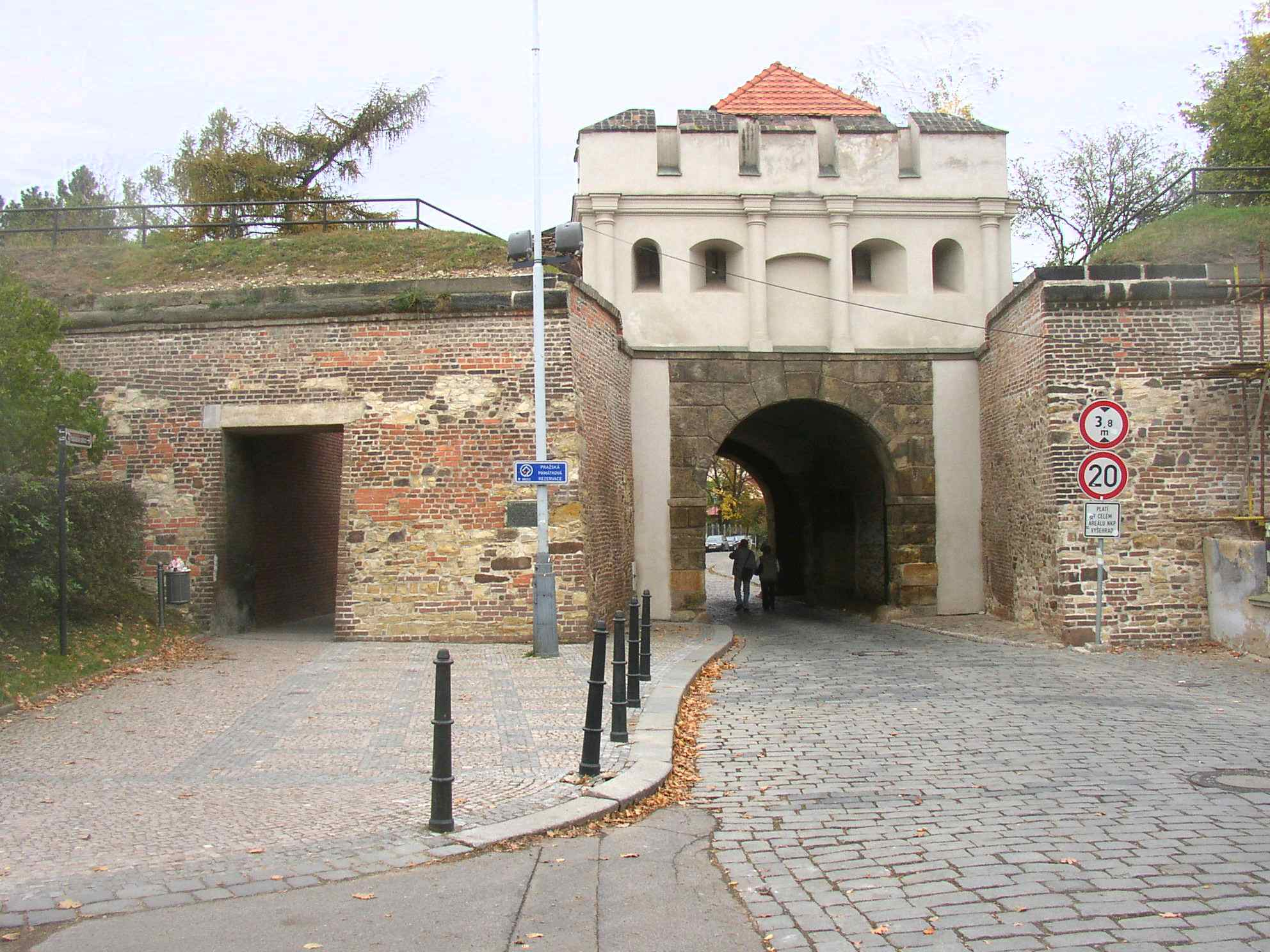 Late renaissance Tábor Gate in Vyšehrad, Prague, Czech Republic One of four preserved city gates in Prague. Built around 1640. Pozdně renesanční Táborská brána na pražském Vyšehradě. Jedna ze čtyř dochovaných městských bran v Praze. Postavena kolem roku 1640. Photo taken by Miaow Miaow in October 2005, PD-self